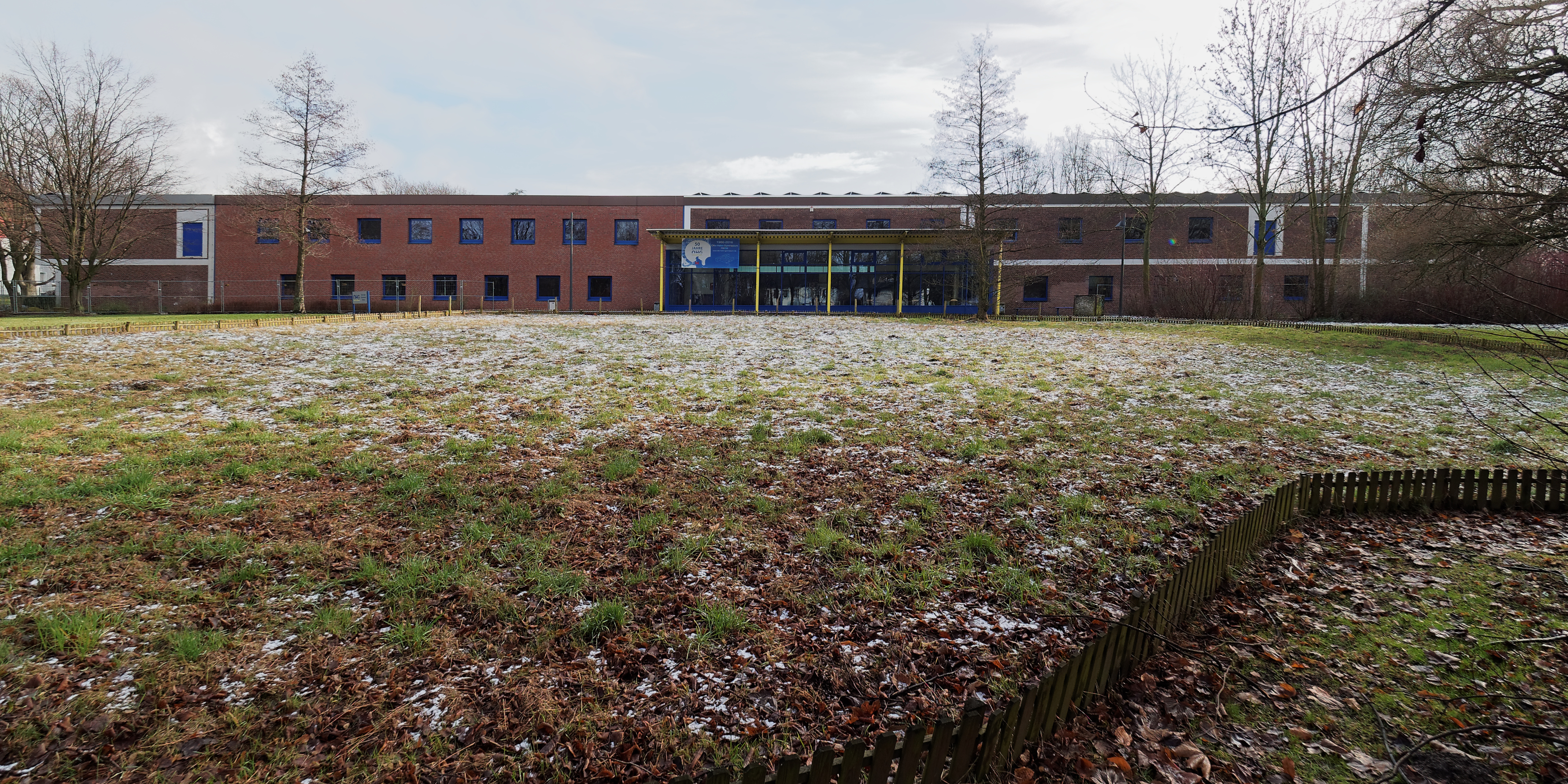 Gebäude des Otto-Hahn-Gymnasiums, Westseite, parallel zum Hölkeskampring gelegen.